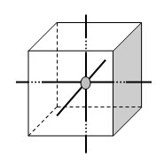 3-dimensional spin network building up volume